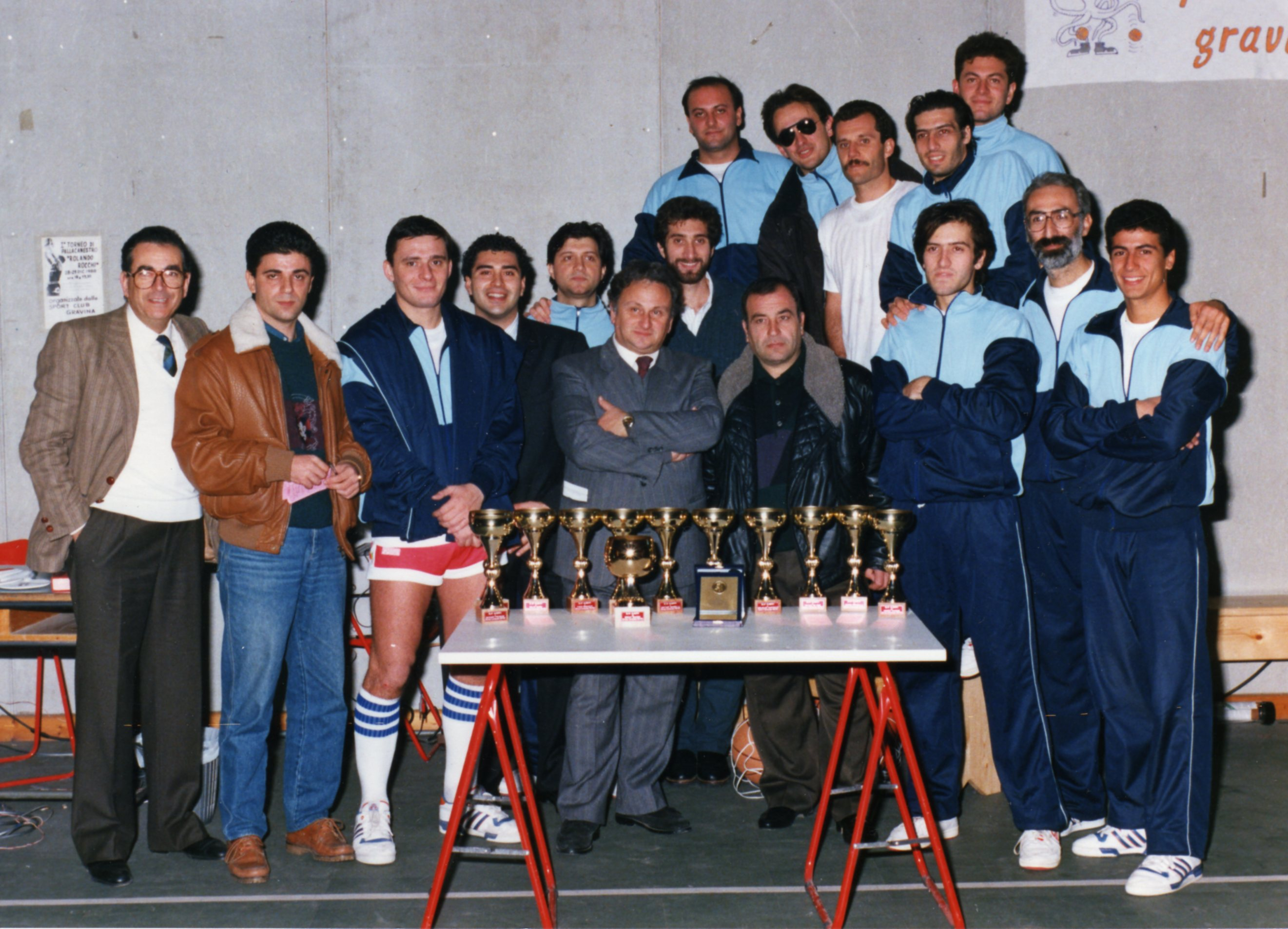 il primo Sport Club Gravina del 1988/89